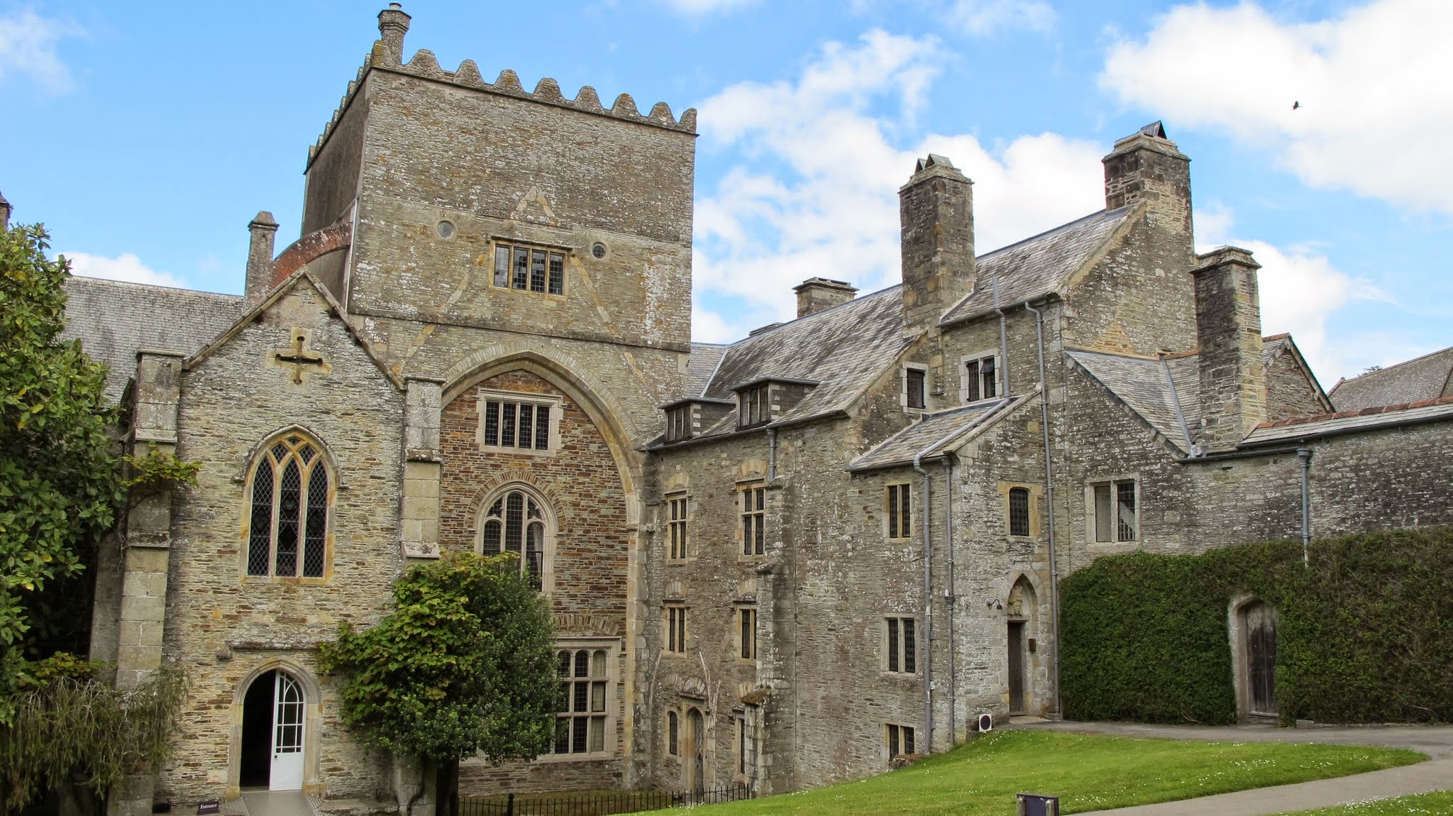 Buckland Monachorum, UK